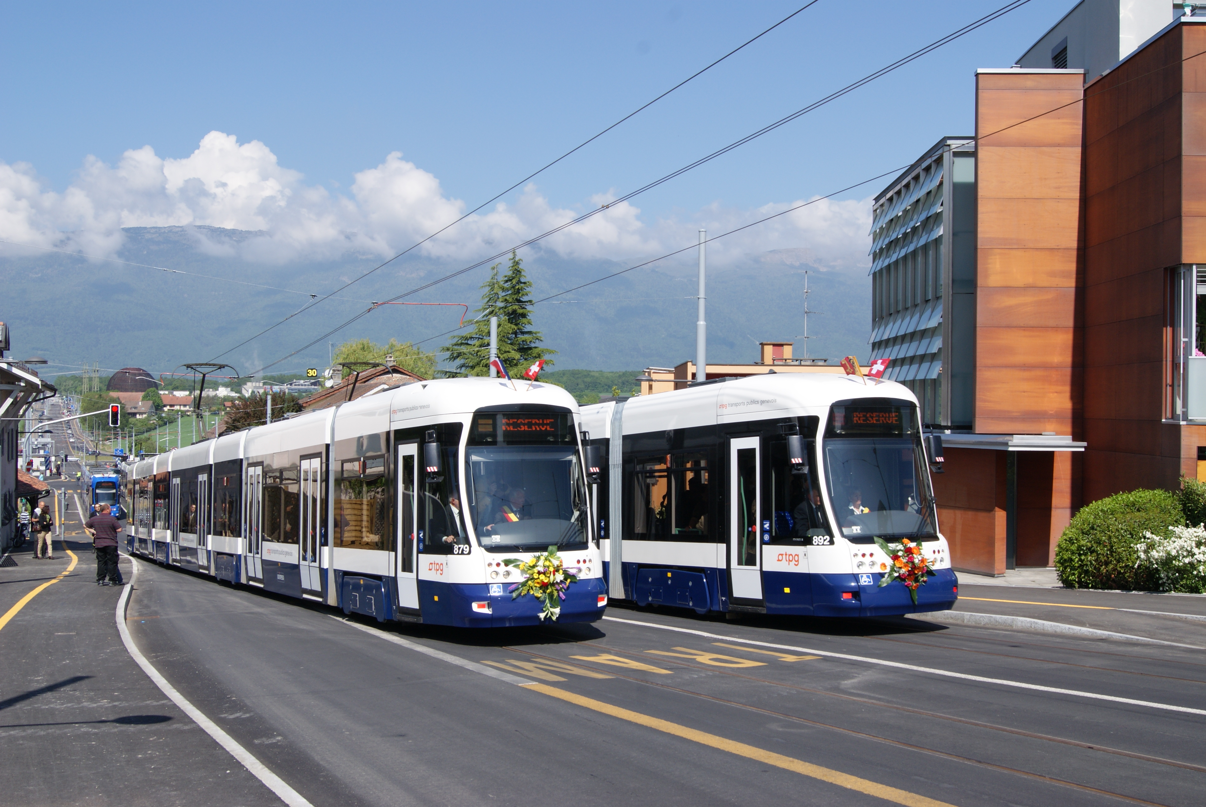 Photo: Trams aux Fils. Samedi 30 avril 2011 a été inauguré le prolongement de la ligne 18, Bois-du-Lan Cern, soit 2.5 kilomètres. De ce fait, la ligne de bus 56 a été supprimée depuis le 02-04-2011.